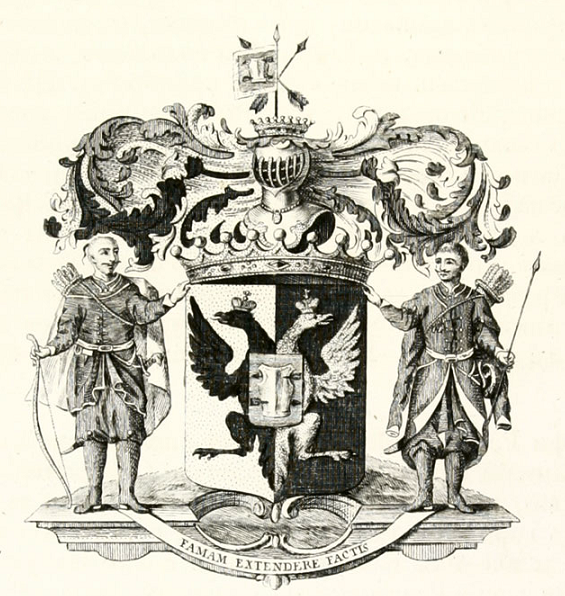 Герб рода графов Разумовских